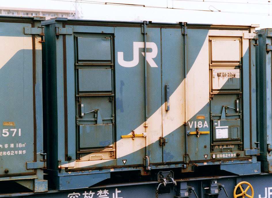 JR貨物 V18A-1